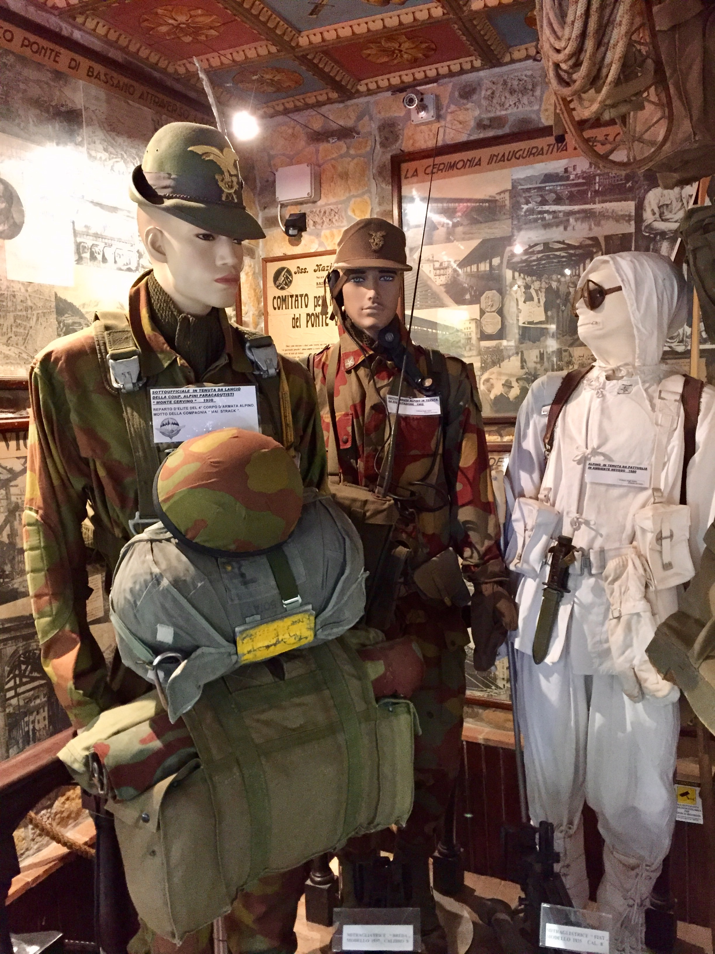 dettaglio